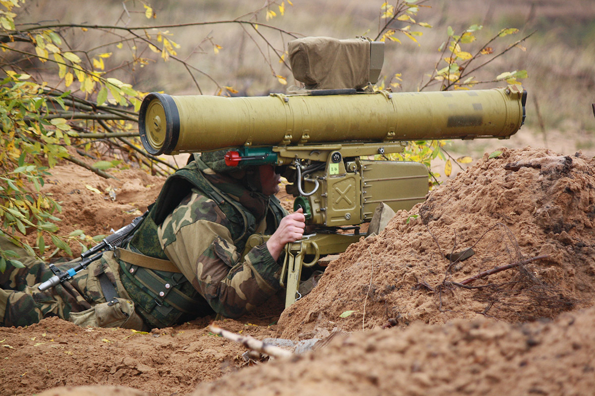 Подразделения ВДВ России и ССО Белоруссии в ходе совместного учения уничтожили условного противника.